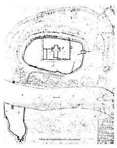 План Петроварадинске тврђаве из 1688. године.